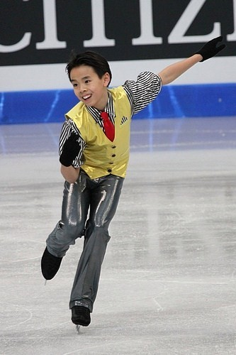 Nam Nguyen (Канада) на чемпионате мира по фигурному катанию среди юниоров 2012